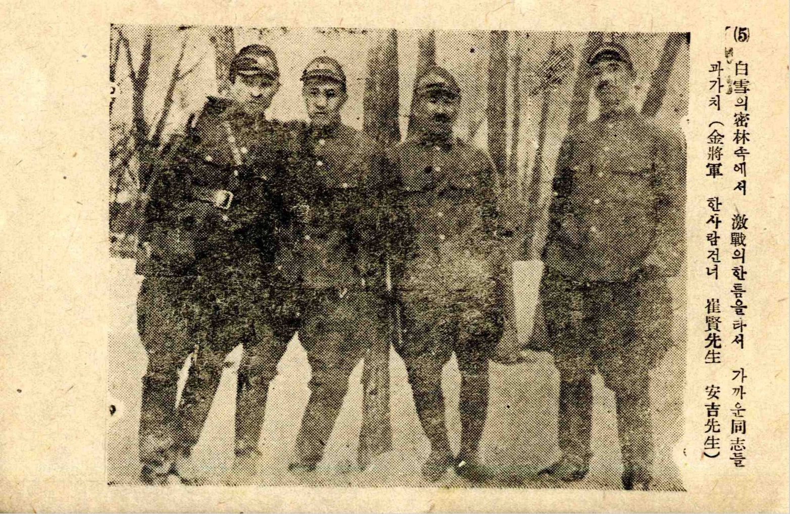 소련군 88여단 시절 김일성과 동료들의 사진. 왼쪽부터 김일성(金日成), 계청(季青, 중국인), 최현(崔贤), 안길(安吉). 계청(季青)은 1943년 가을 일본 스파이 혐의로 숙청되어 강제노역에 처해지므로, 그 직전의 사진으로 보인다. 1947년에는 북한도 이 사진을 원본 그대로 실었고, 평양에서 발행된 잡지 『등대』 1964년 4월호까지도 조작없이 그대로 실었다. 『등대』 1965년 10월호에는 인물 배치는 그대로 두고 남루한 복장만 수정하였다. 1967년 10월 사진에 계청만 삭제하고 김일성은 똑 바로 선 모양으로 조작했다가 1972년 4월부터 김일성을 가운데로 옮겨 놓았다.